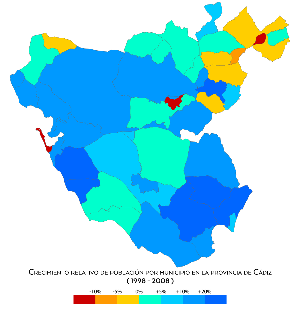 Crecimiento relativo de la población en la provincia de Cádiz entre los años 1998 y 2008